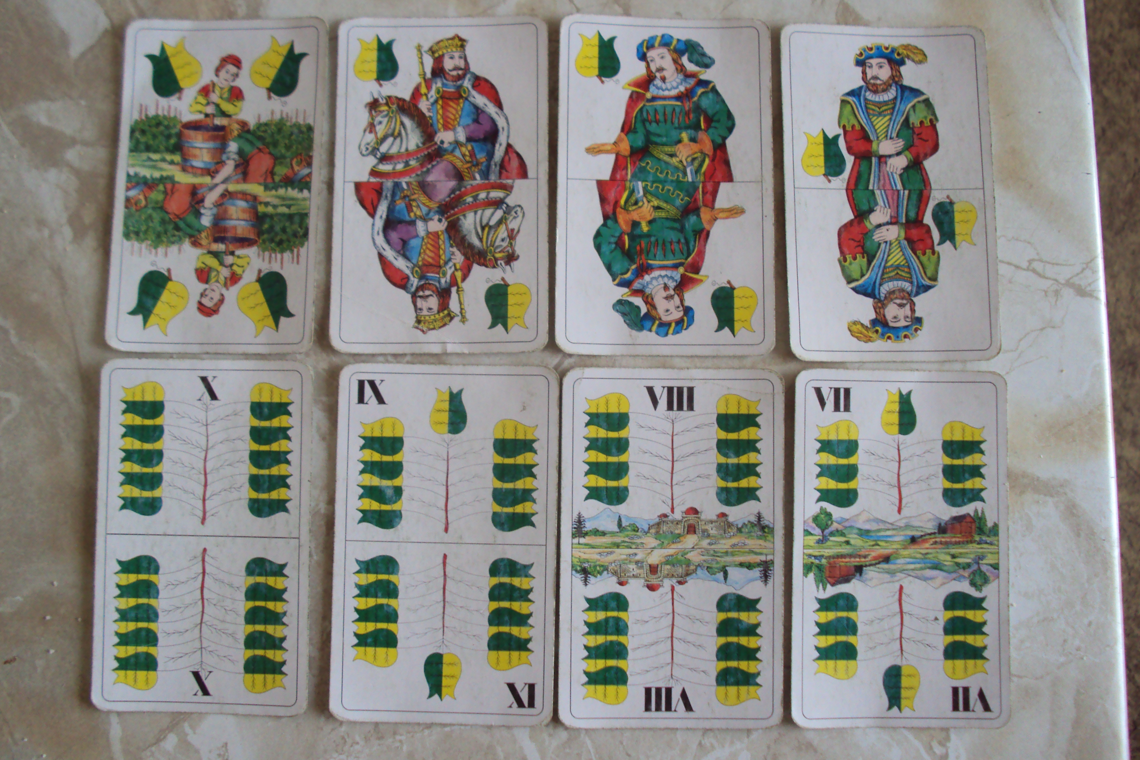 Zelená barva na německých kartách